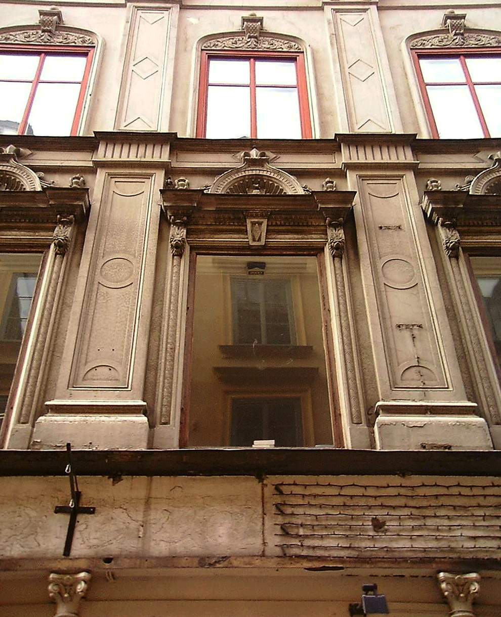 Front of 28, Västerlånggatan. Gamla stan, Stockholm.